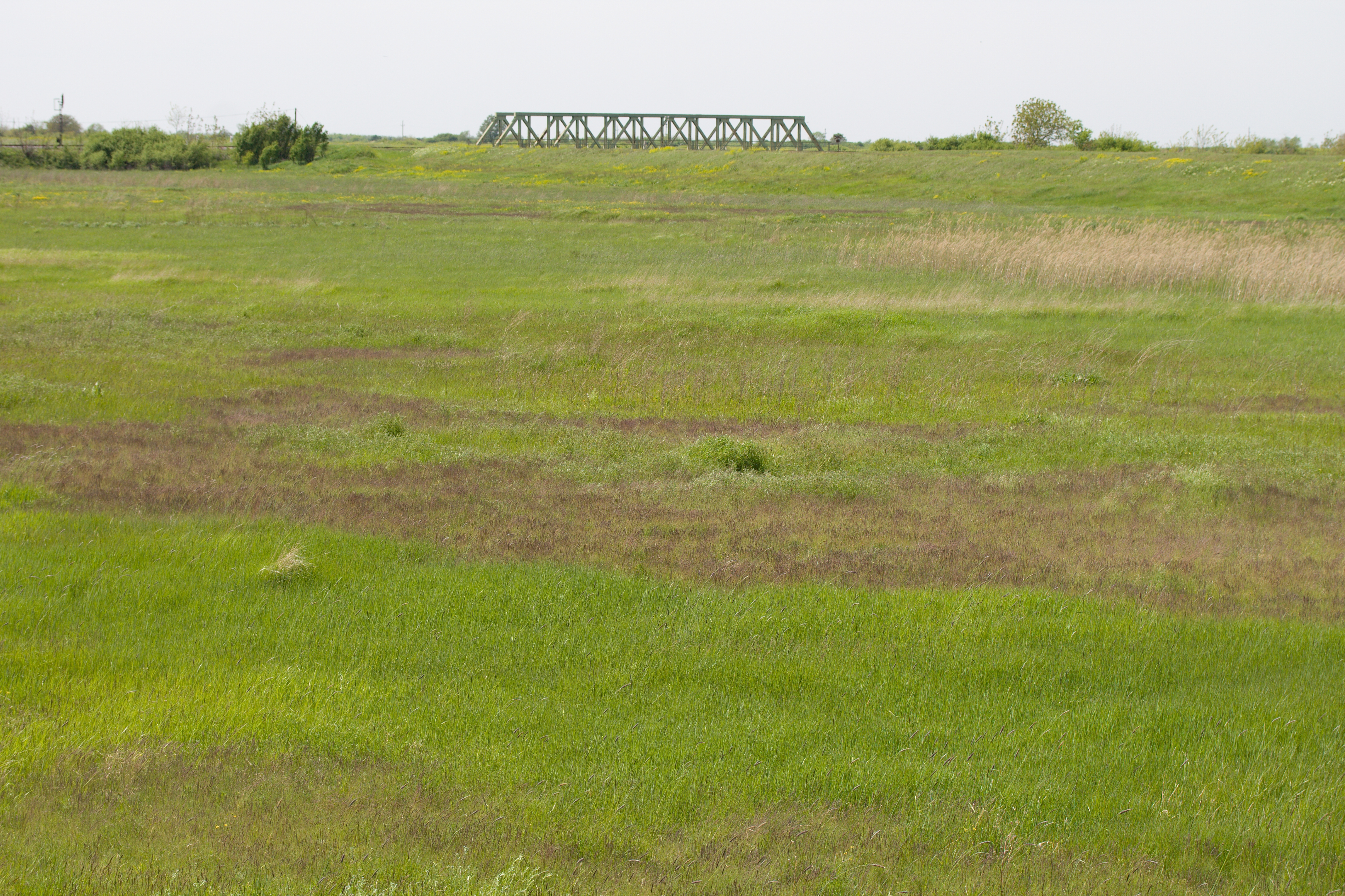 Изглед слатинског станишта